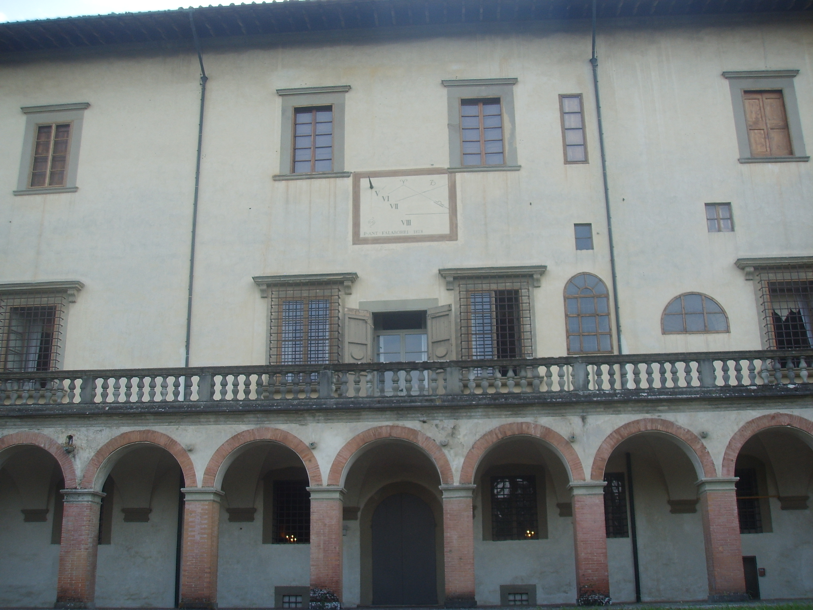 Poggio a Caiano Villa outside view in Poggio a Caiano, Italia